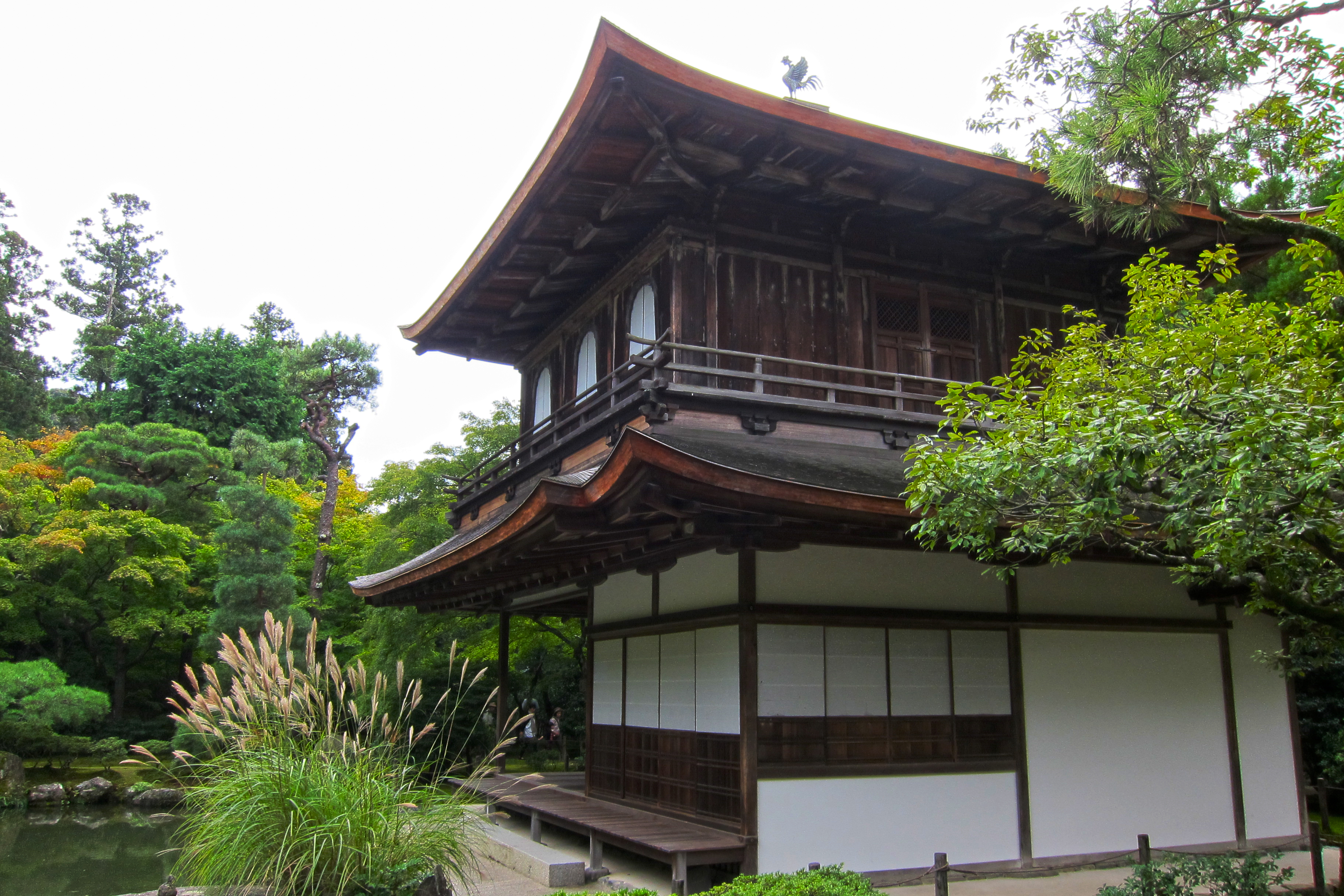 Ginkakuji (銀閣寺), Kyoto, Kyoto prefecture, Japan